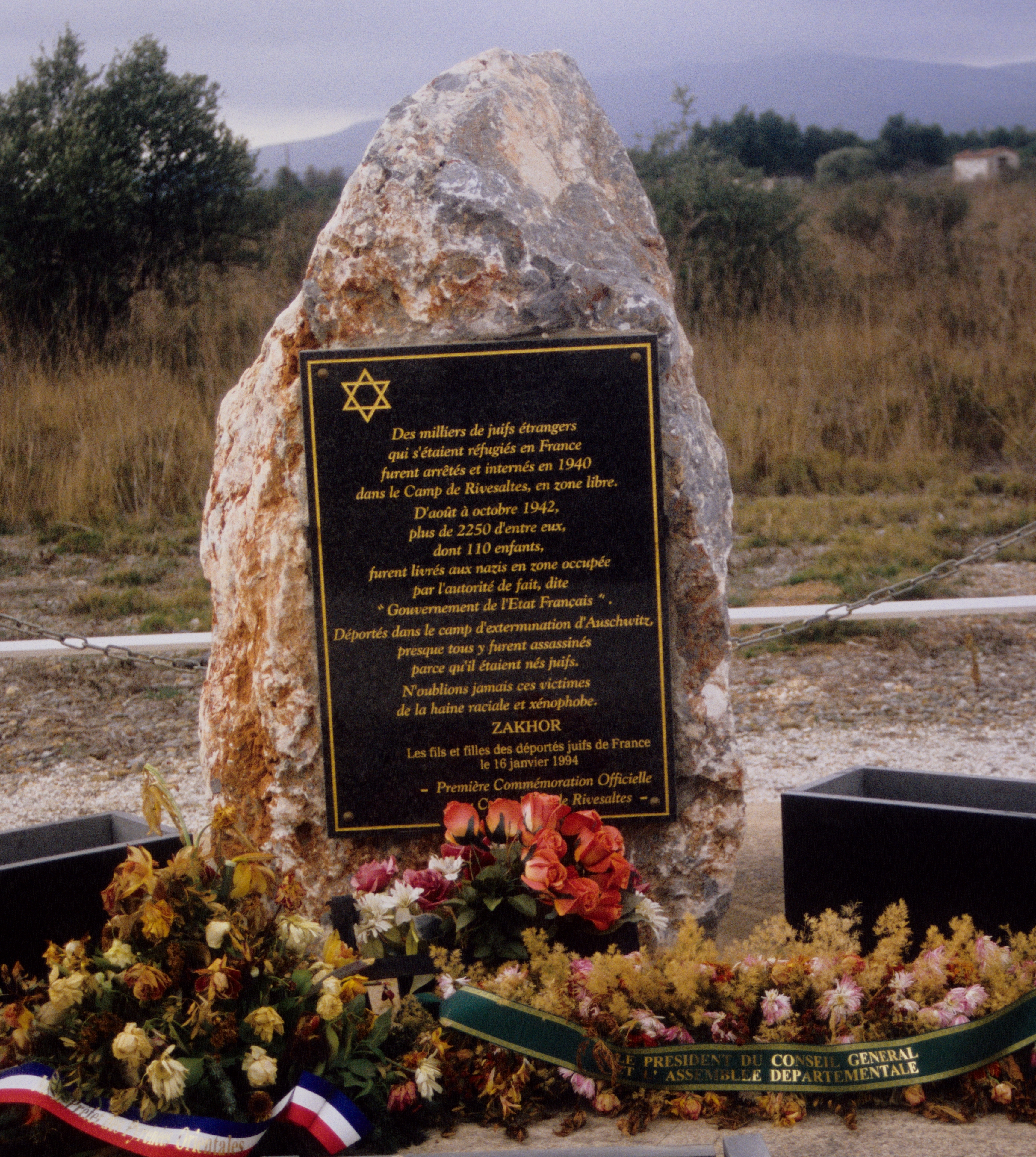 commemorative stele for the juifs victims of the Camp de Rivesaltes (offered by the fils et filles des déportés juives de France), Stèle commémorative pour les victimes du Camp de Rivesaltes (offerete par les fils et filles des déportés juives de France), Gedenkstele für die jüdischen Opfer des Lagers Rivesaltes (gestiftet von den fils et filles des déportés juives de France)(Camera = Canon EOS 500, Film = Sensia 100)